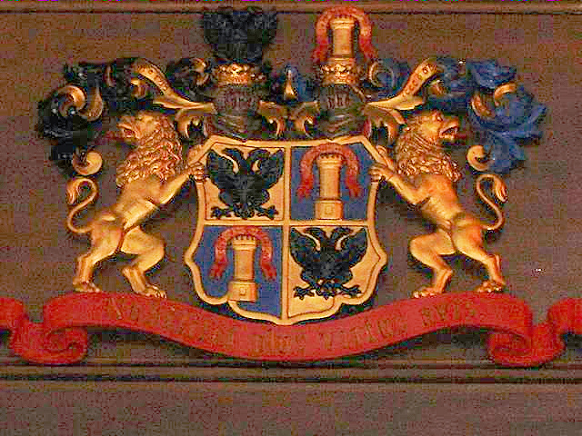 Foto des Hennigs'schen Patronatsgestuehls in der Thomaskirche zu Tribsees